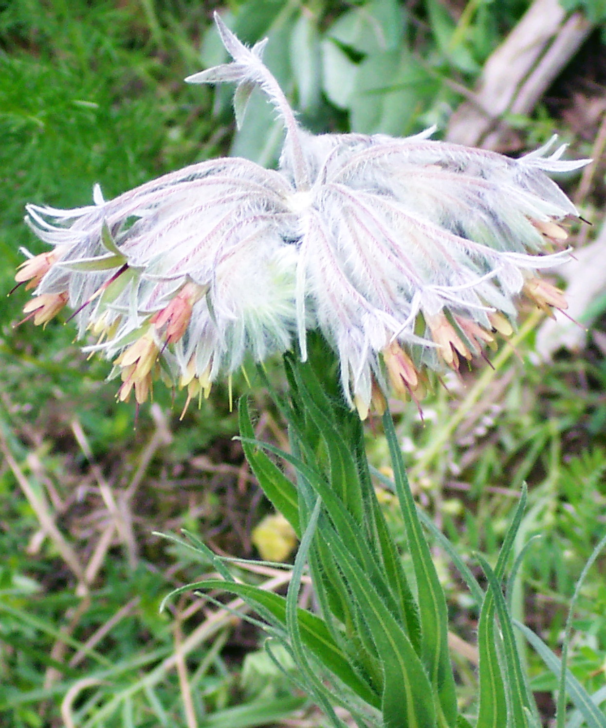 Rindera umbellata in Deliblato Sands